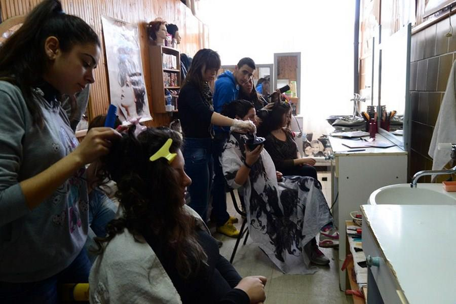 Фризер